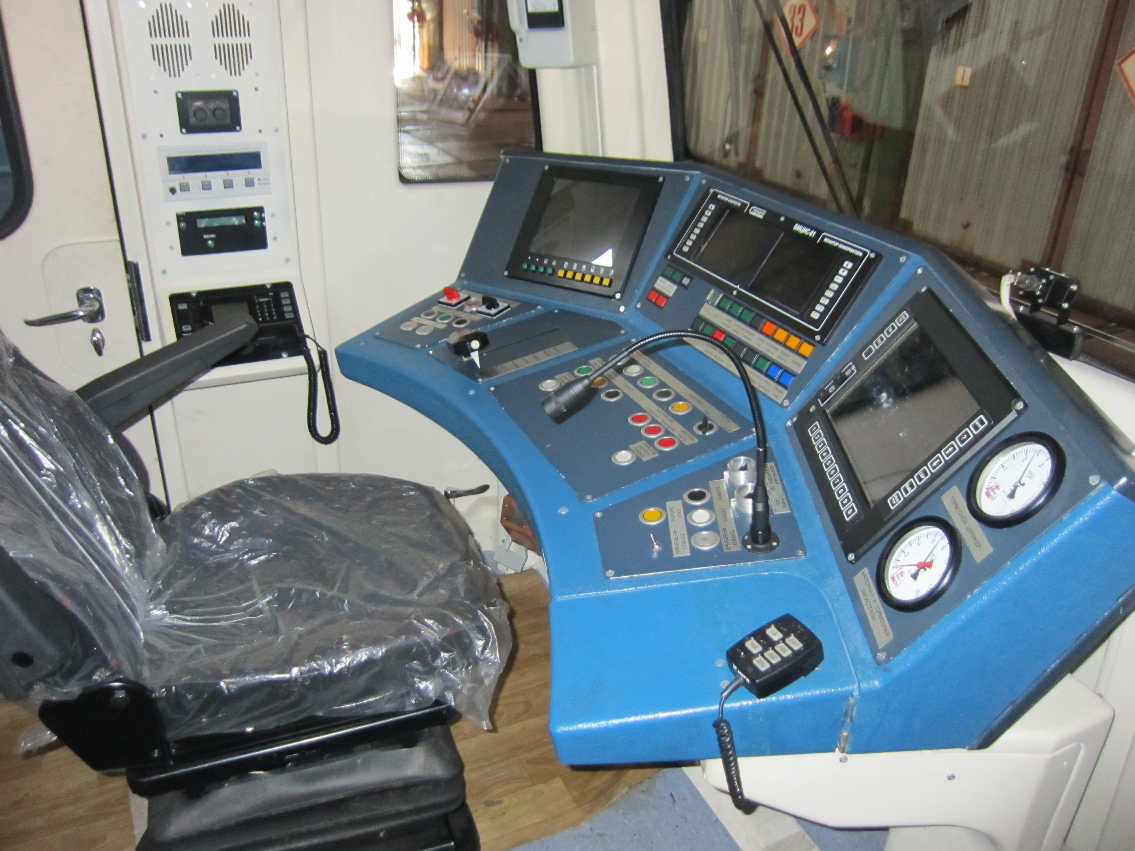 Пульт машиниста вагона метрополитена модели 81-780 Ладога